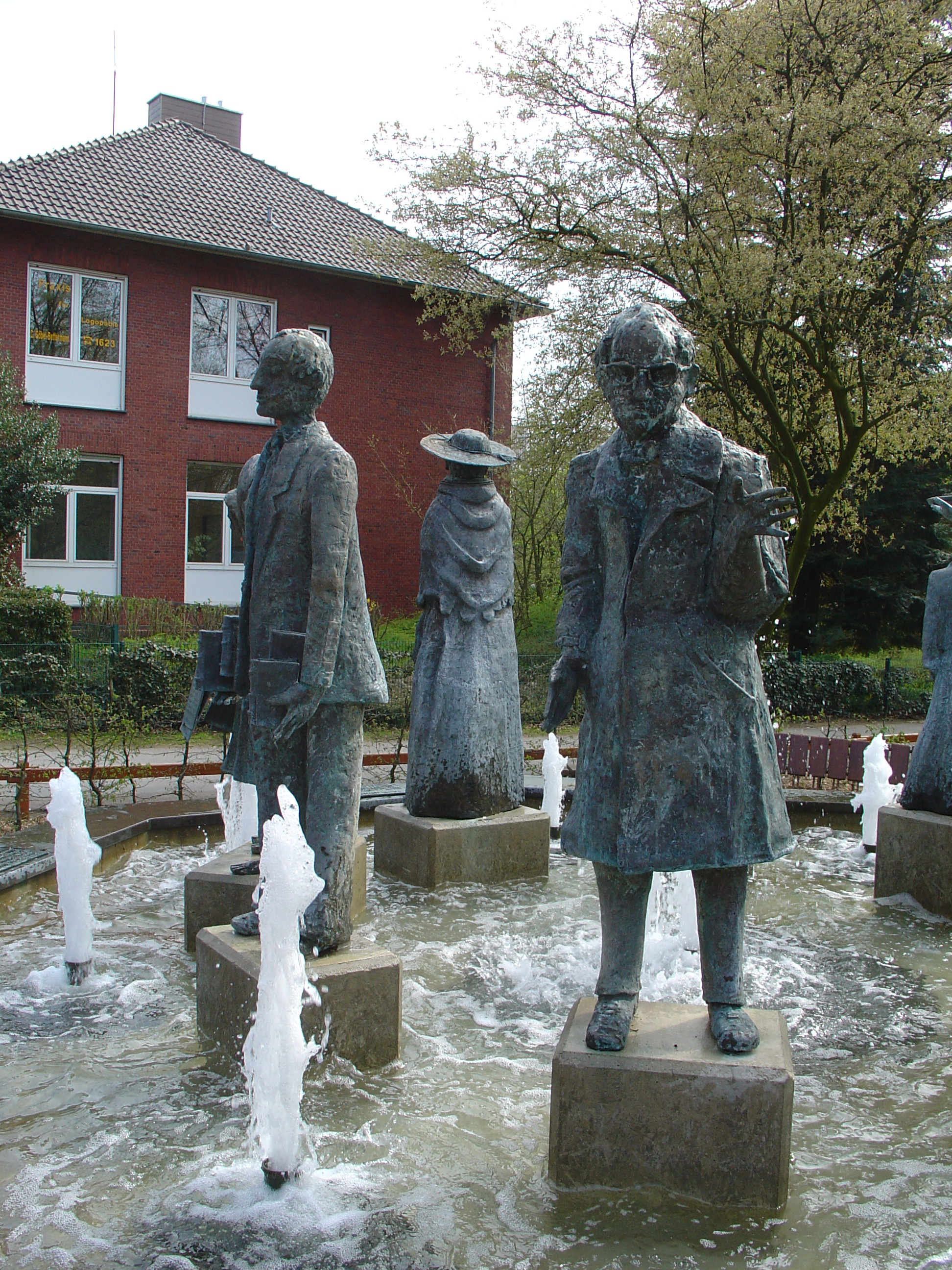 Detail aus dem Dichterbrunnen in Harsewinkel. Links Bürgermeister Otto Schmitz, rechts Bürgermeister Heinrich Hemker.